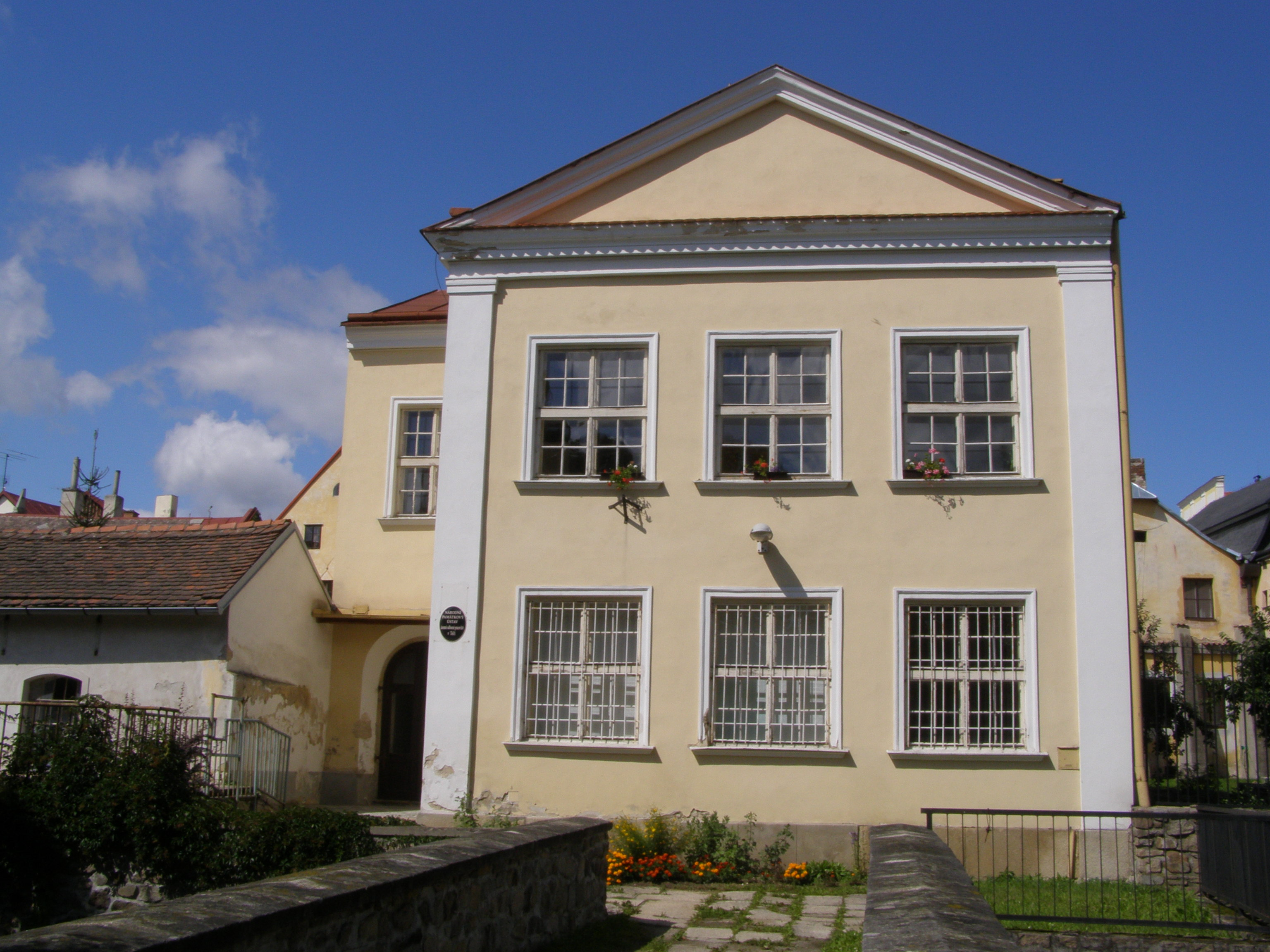 Telč, ulice Na Parkáně, bývalá synagoga, dnes sídlo Národního památkového ústavu